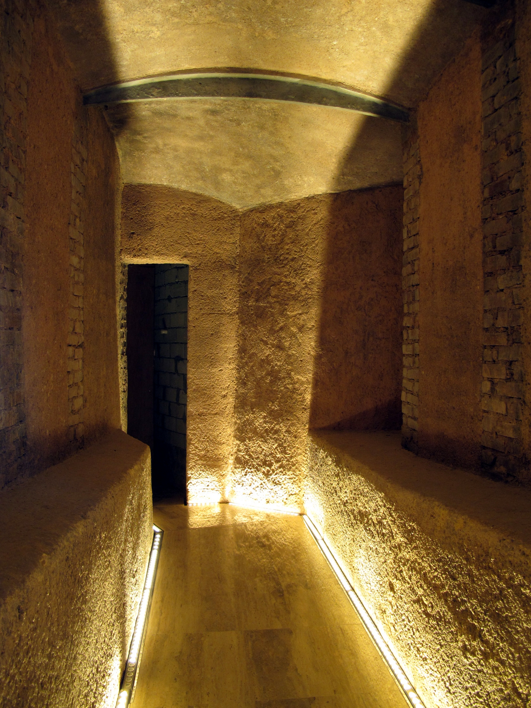 1881 Heritage Shelter Tunnel